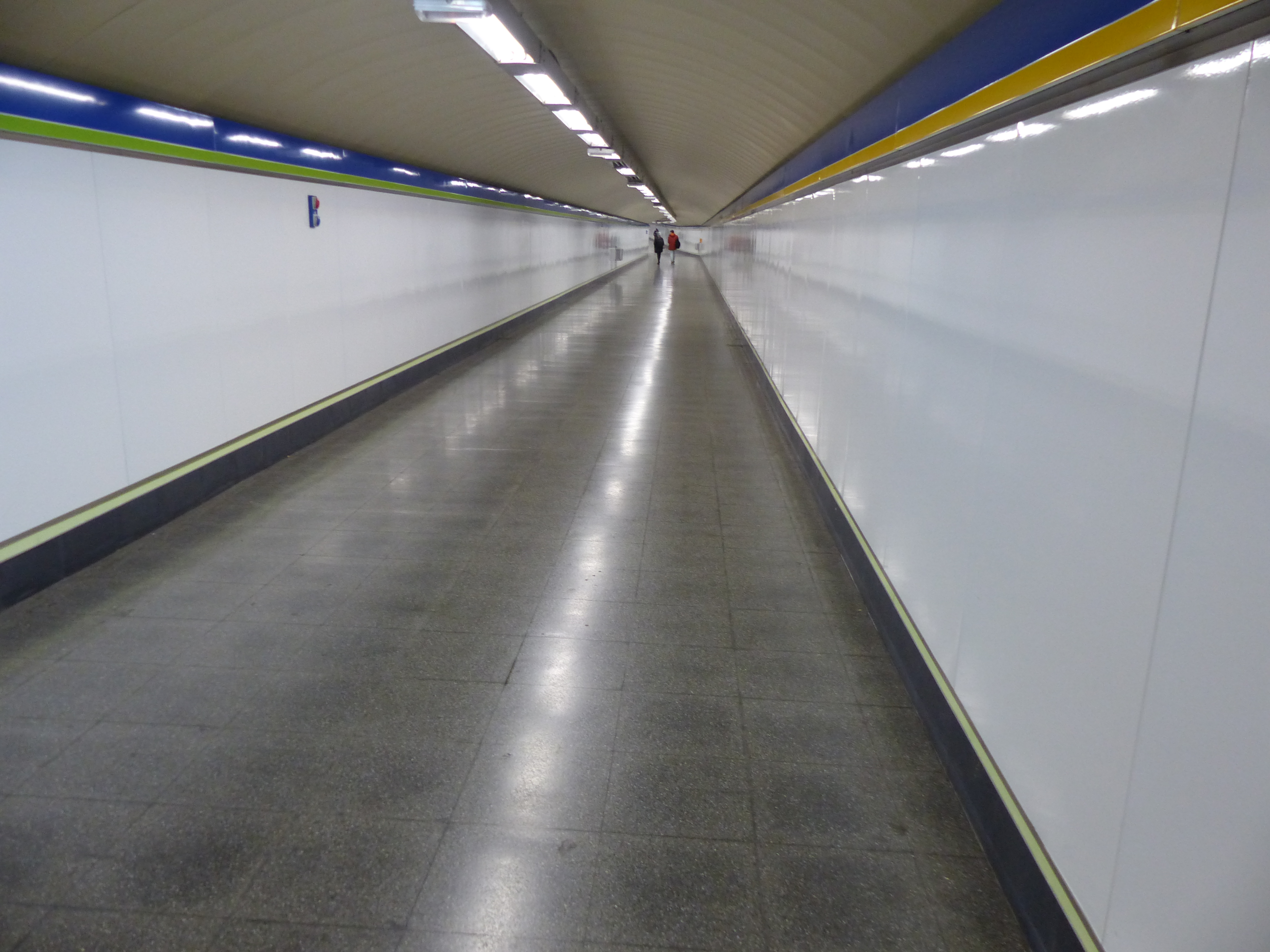 Estación de Embajadores, túnel de enlace con Acacias.